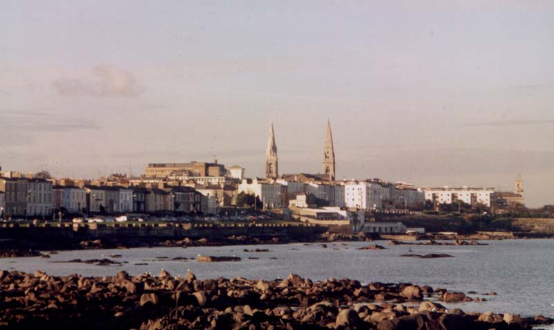 Dun Laoghaire